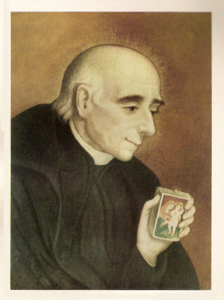 Image pieuse de Saint Vincent Pallotti